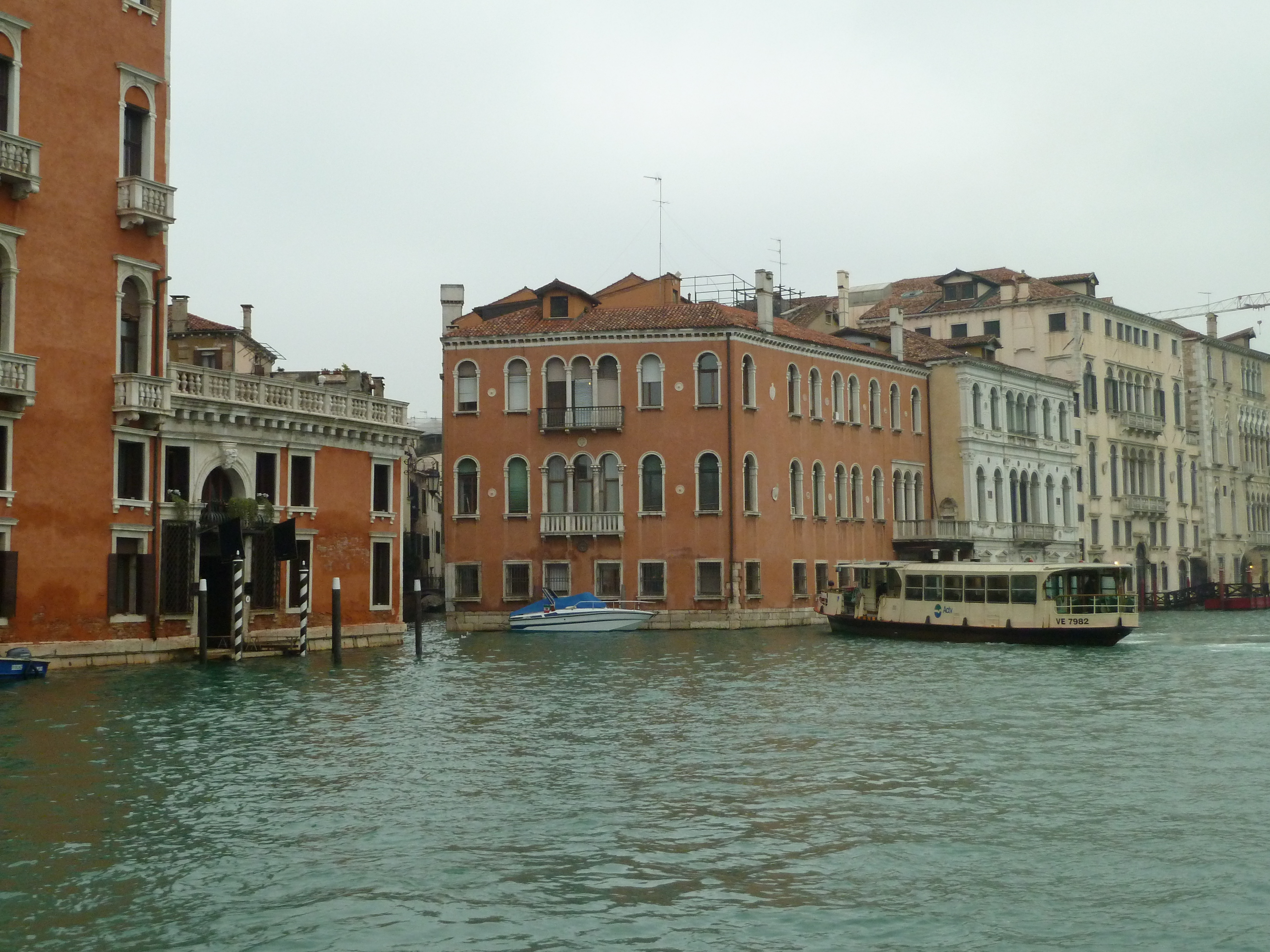 Ca' Cappello Layard Carnelutti (Venice)